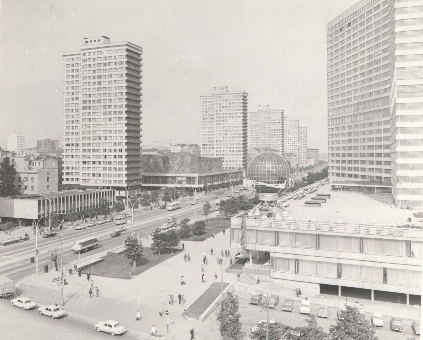 Проспект Калинина, 1978 год. Архивный снимок.